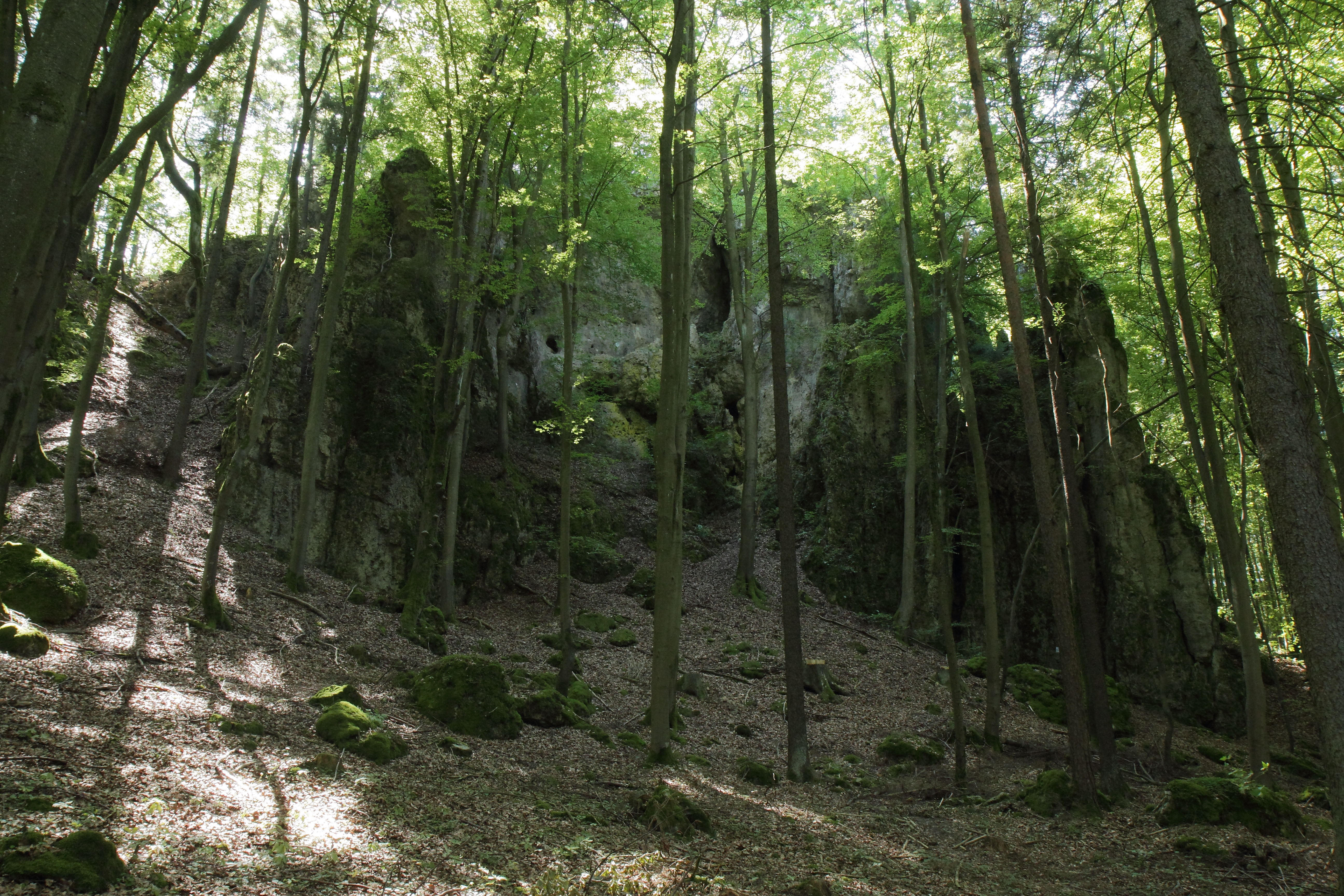 Abschnittsbefestigung Kuhfels - Ansicht der Spornspitze des Naturdenkmals Kuhfelsen